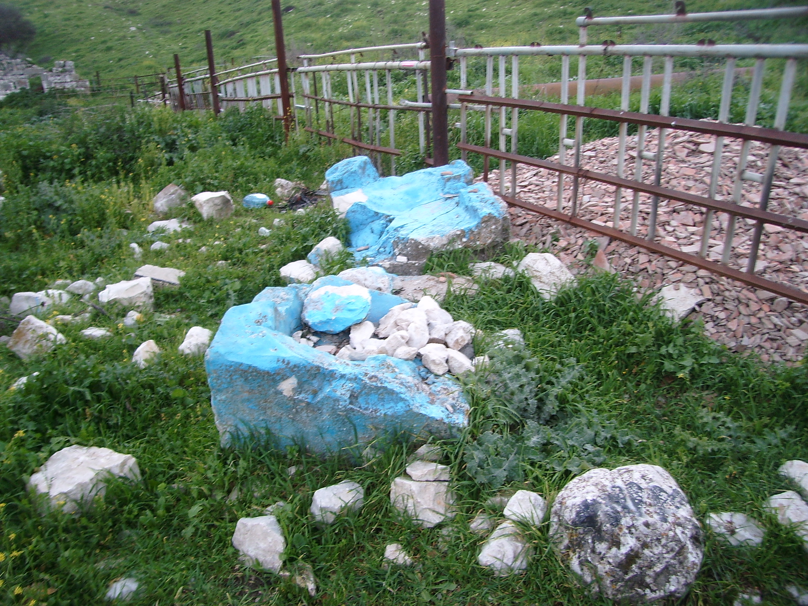 קבר אשר ונפתלי בני יעקב בקדש נפתלי